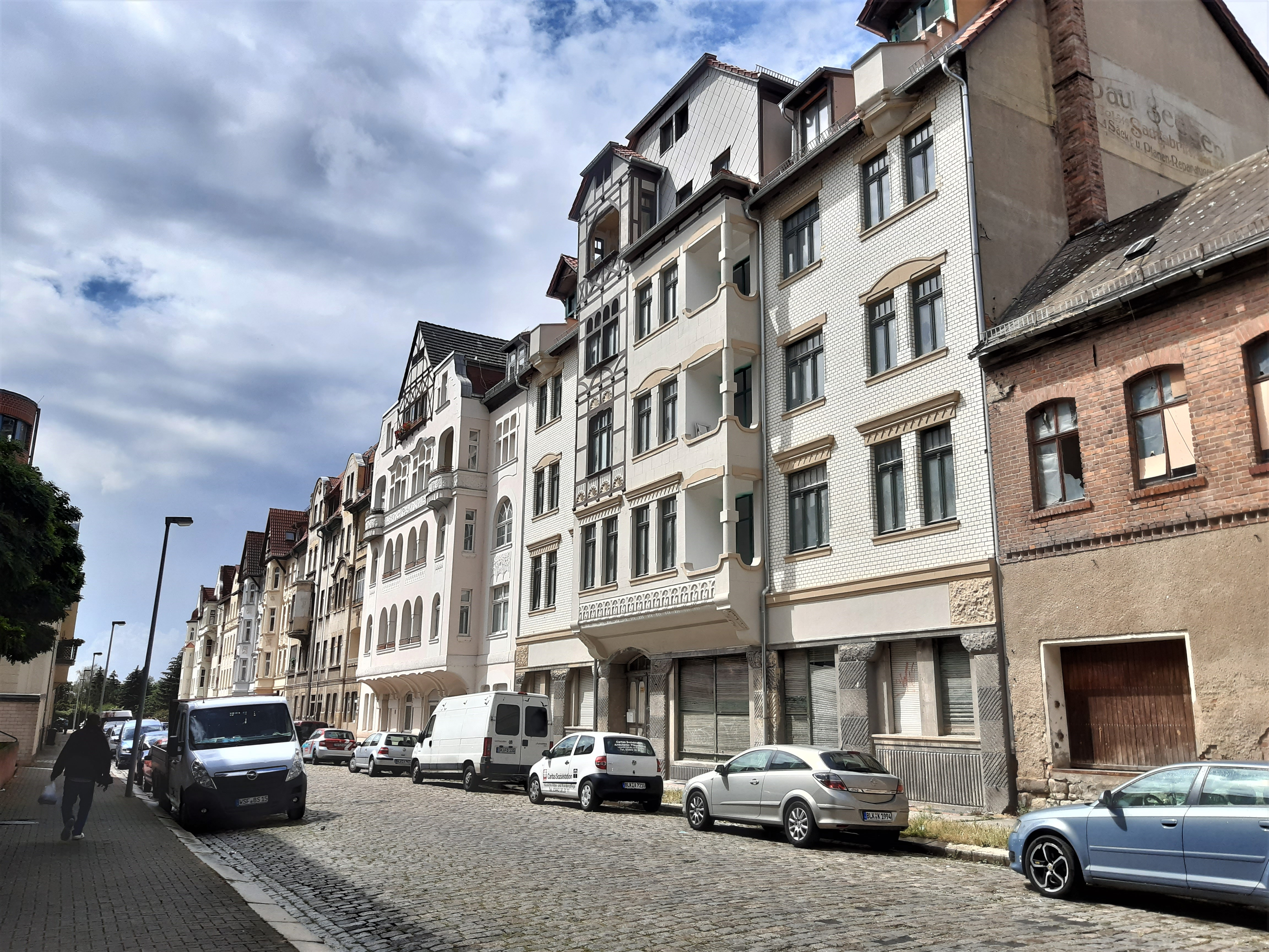 Straßenzeile Gutenbergstraße 1, 3, 5, 7, 9, 11, 13, 15, 17 , Weißenfels